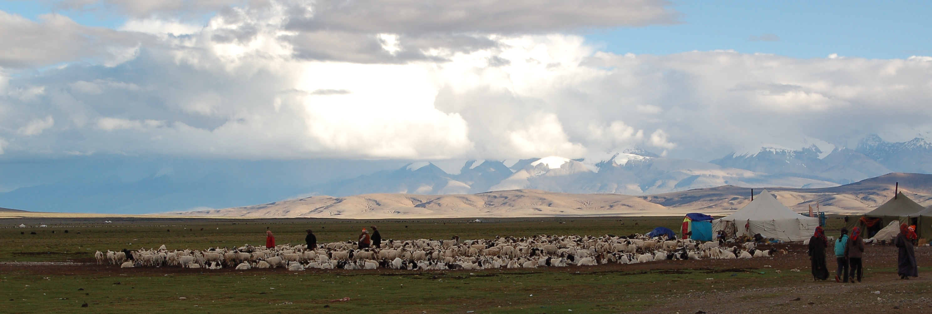 Nomadenzelte und Schafherde in der Nähe des Kailash (Tibet)